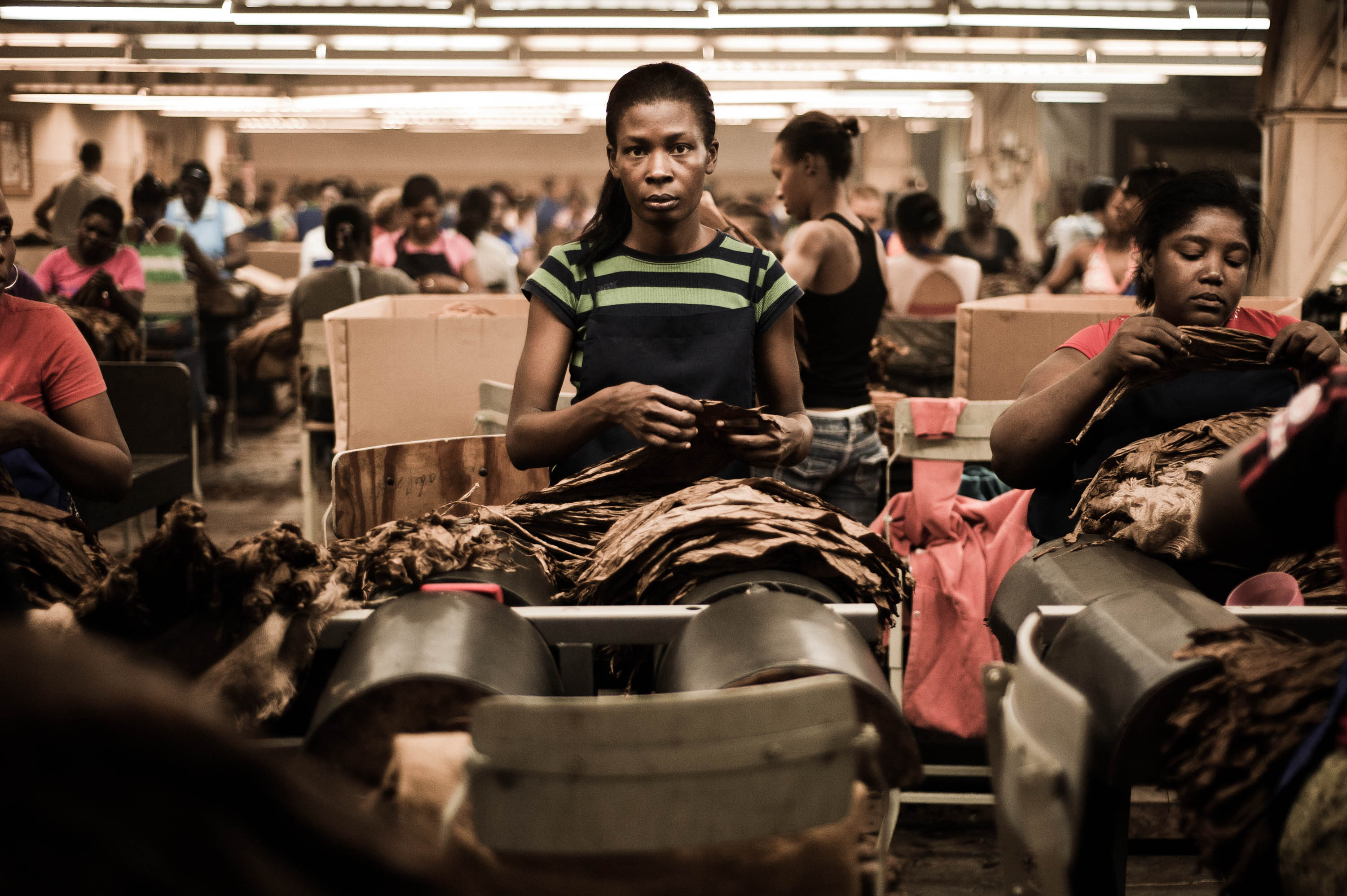 Keywords:Caribbean; Casa Del Campo; Cigar factory; Dominican Republic; La Romana; Домениканская республика; Карибские острова; Ла Романа; Фабрика Сигар Handmade cigar production. Manufacture worker. Tabacalera de Garcia Factory. Casa de Campo, La Romana, Dominican Republic.